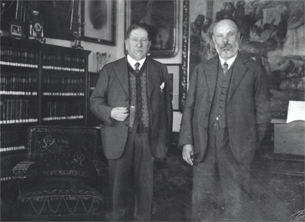 ירושלים - מר אוסישקין וסוקולוב בחדר הרצל